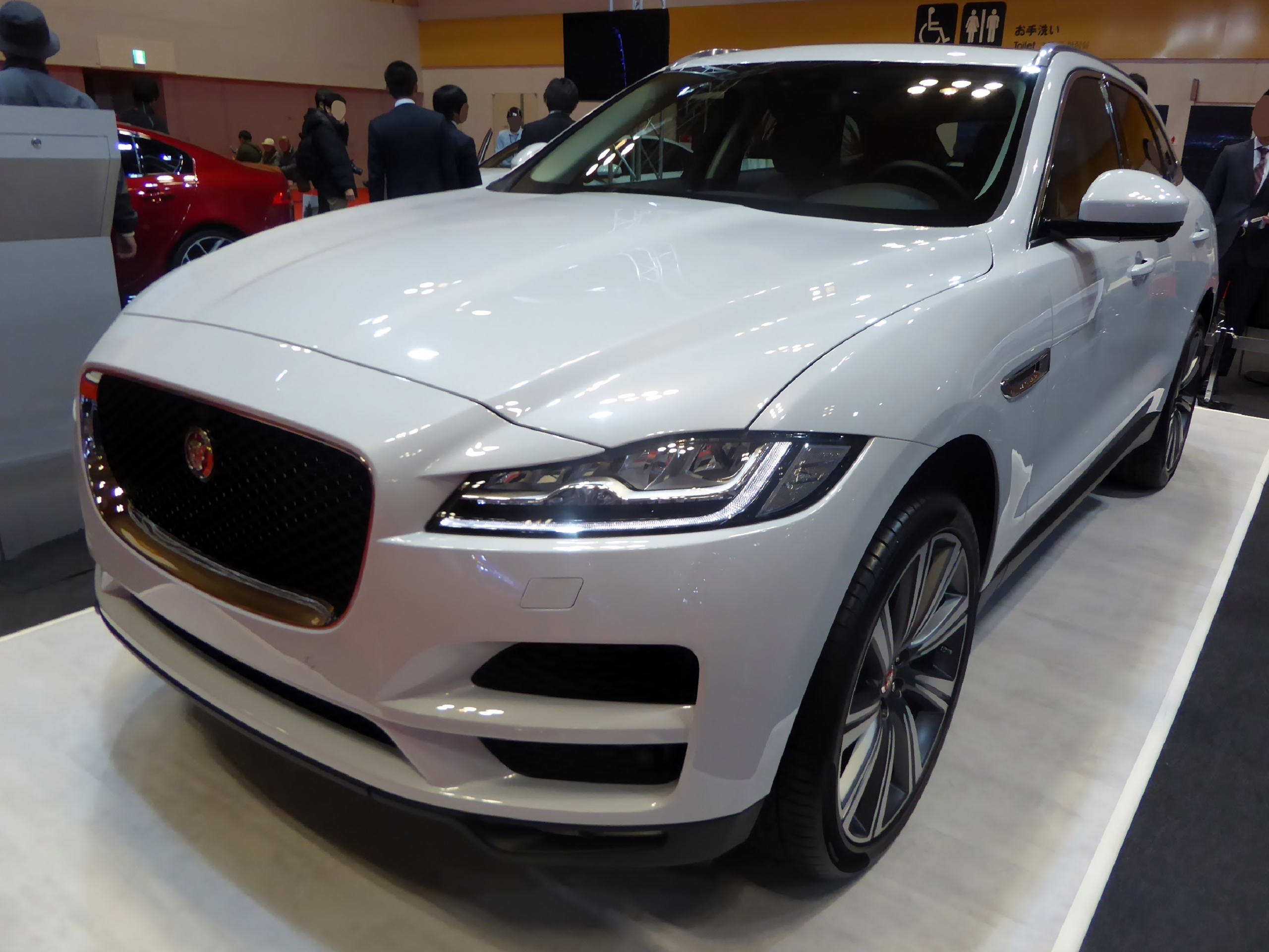 大阪モーターショー2015においてジャガー・F-ペースを撮影。